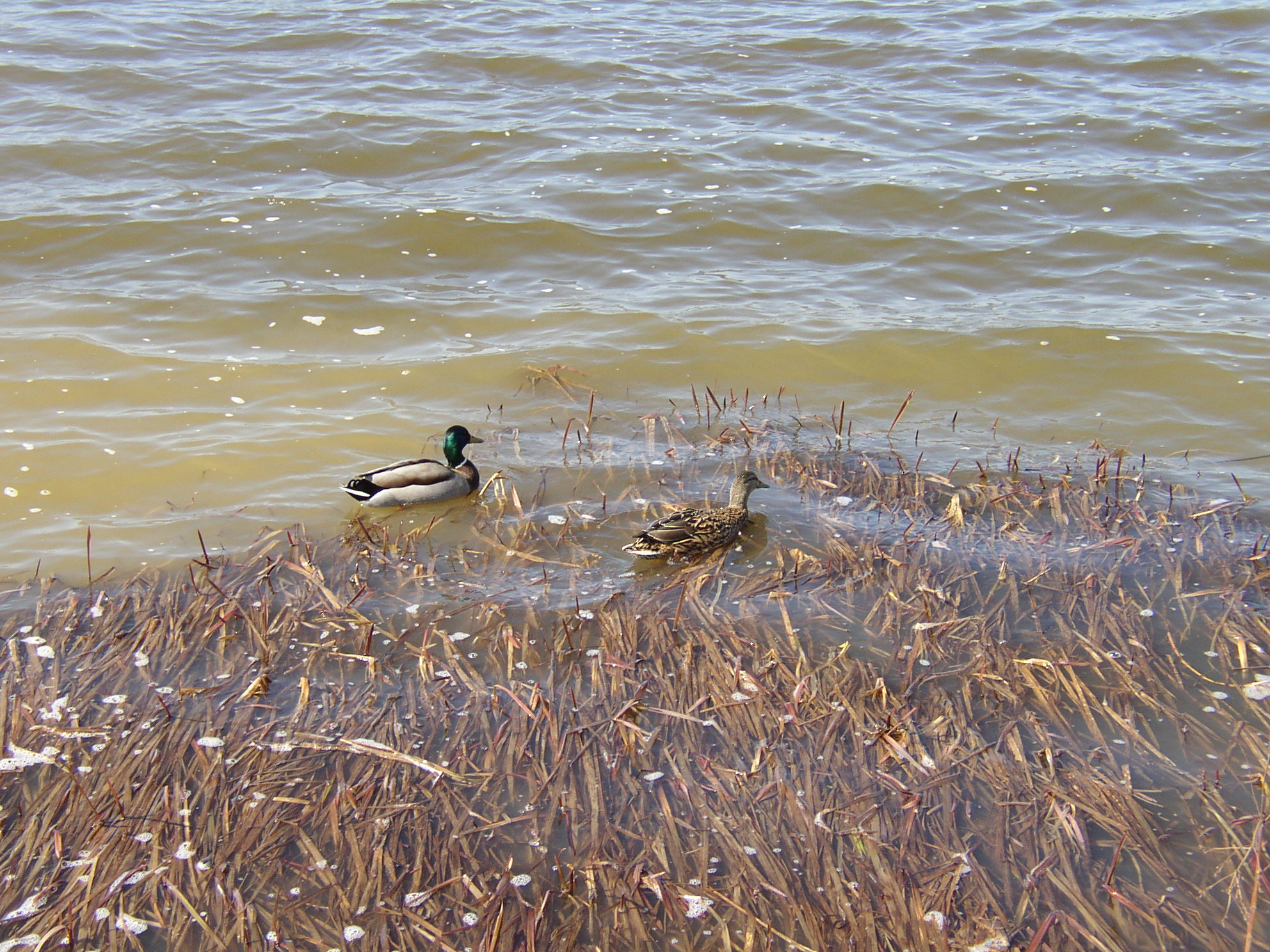 Velký rybník - Česká republika, Ústecký kraj, okres Děčín, Rybniště, kachna divoká